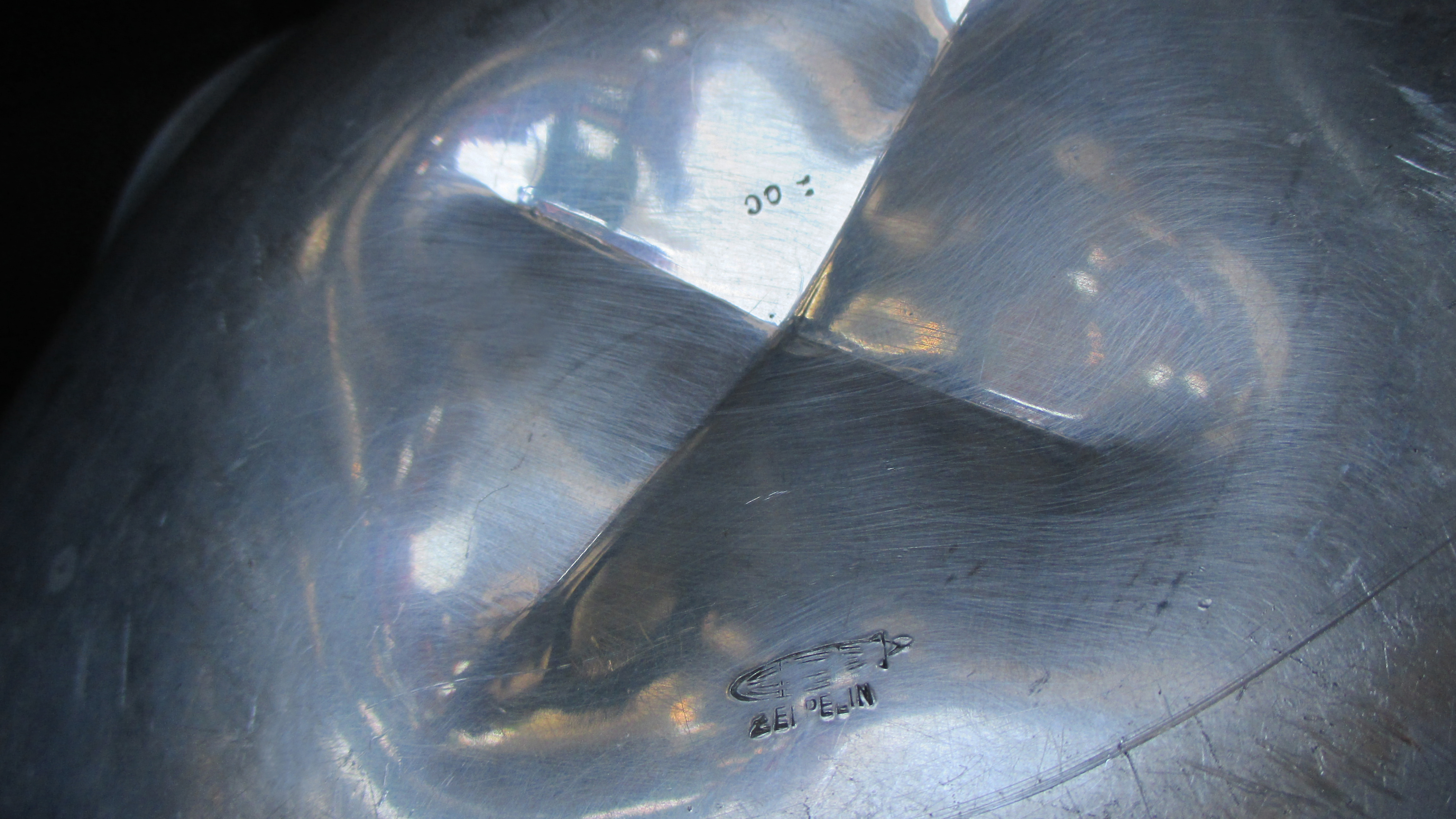 Deutsche Zeppelinreederei - Luftschiffbau Zeppelin - Großer Teller aus dem Service eines Luftschiffes - Gefertigt aus Aluminium - Gestempelt mit Zeppelin und Schriftzug Zeppelin_2